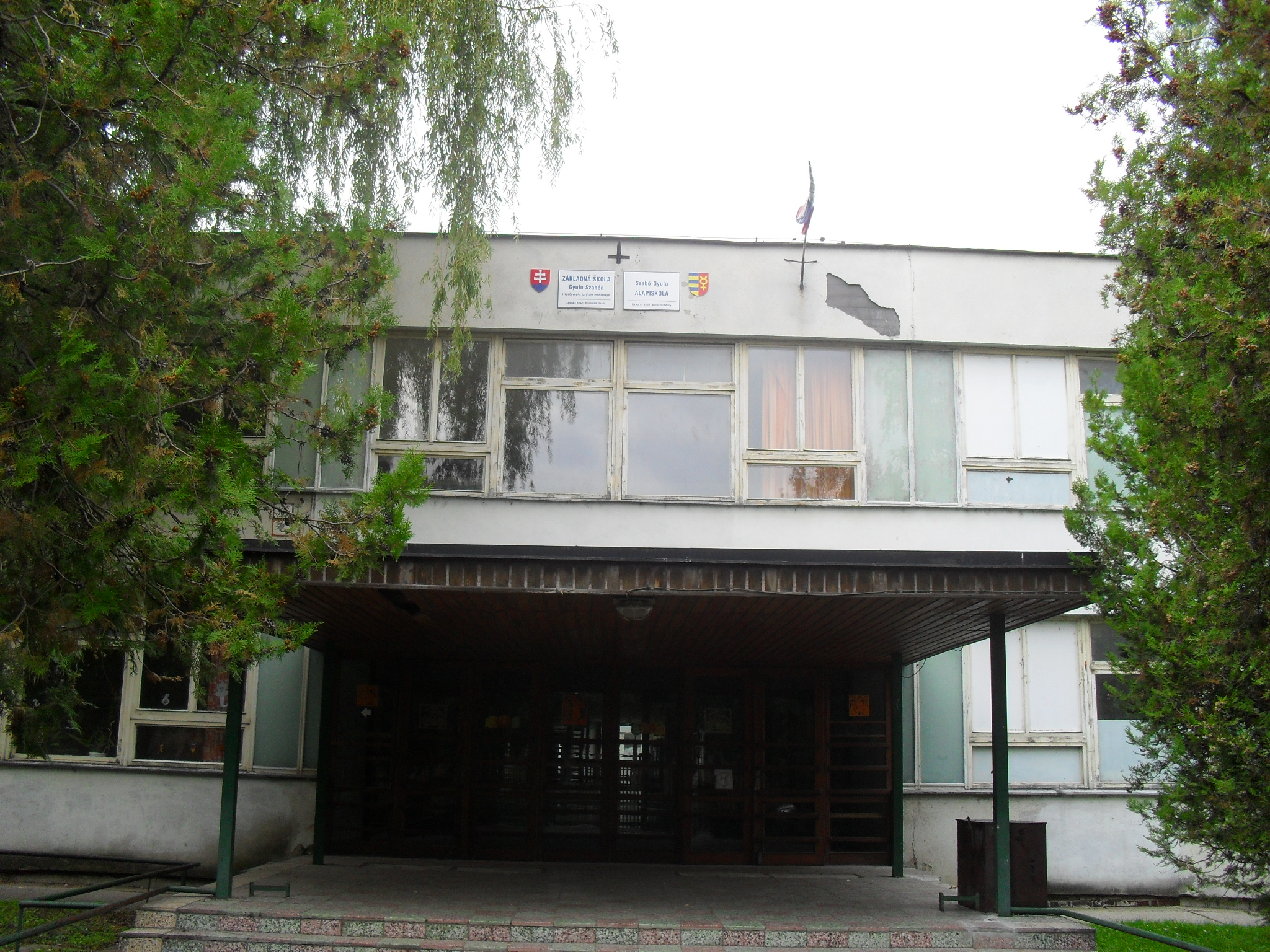 Dunaszerdahely - Szabó Gyula Alapiskola